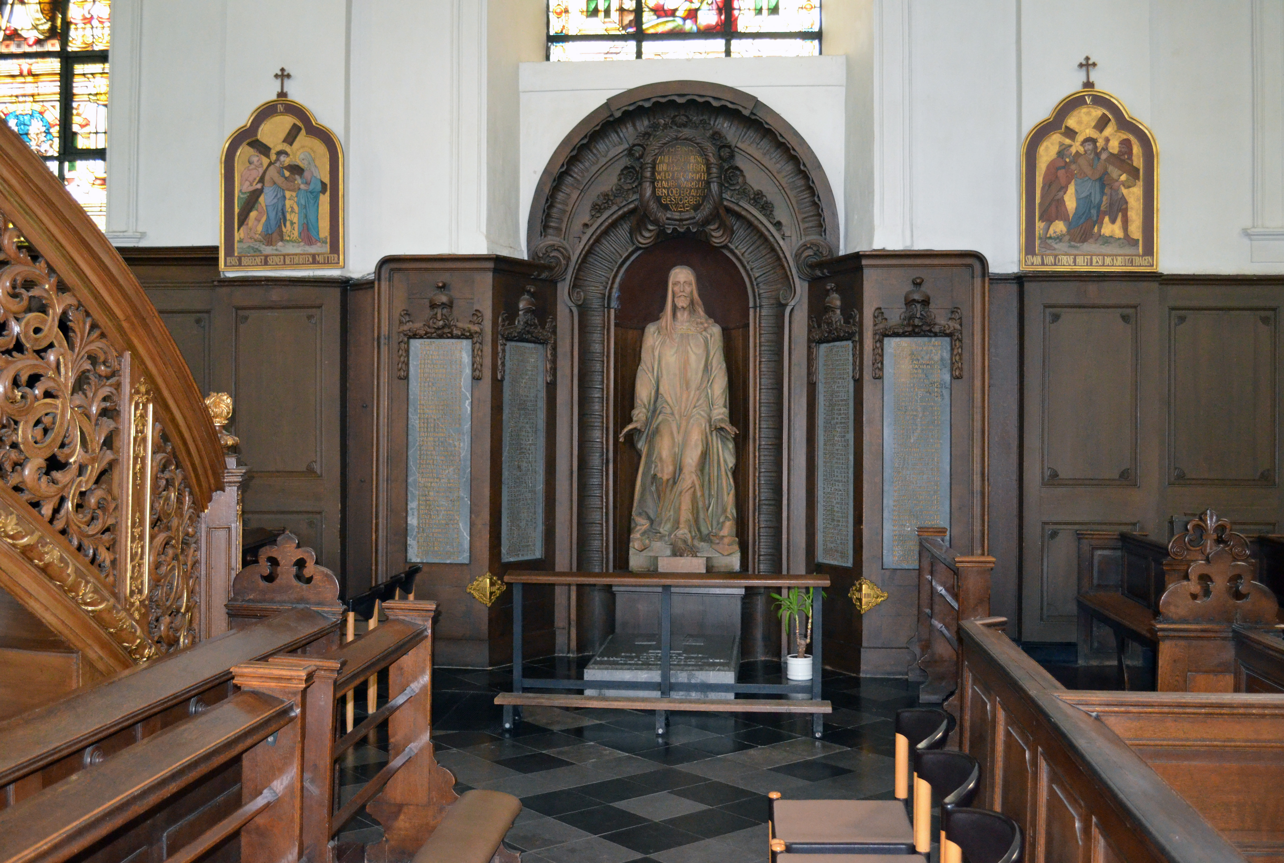 Kirche St. Nikolaus in Eupen, Innenansicht